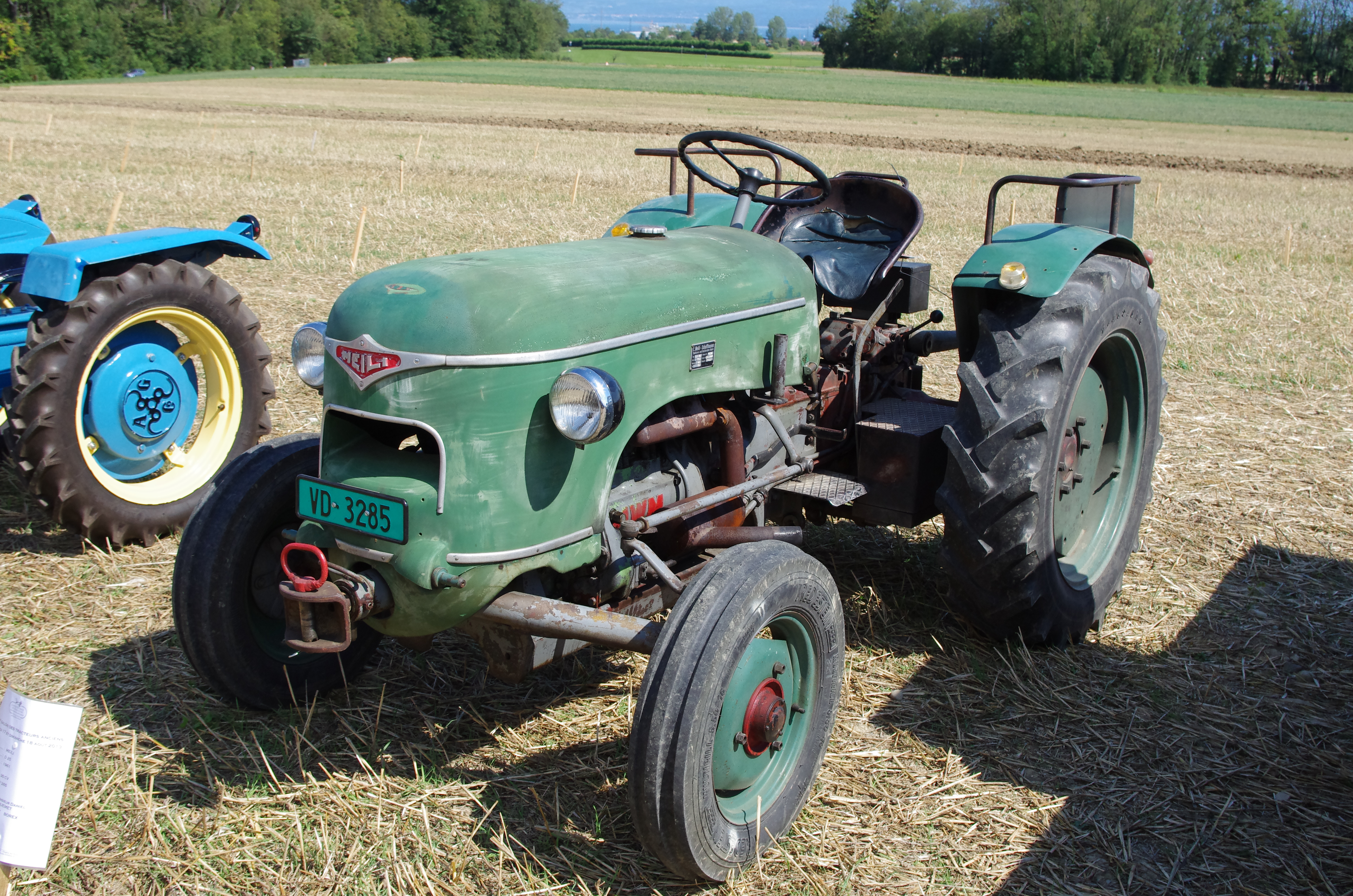 Tracteur Meili D 25 - 1961 - gauche